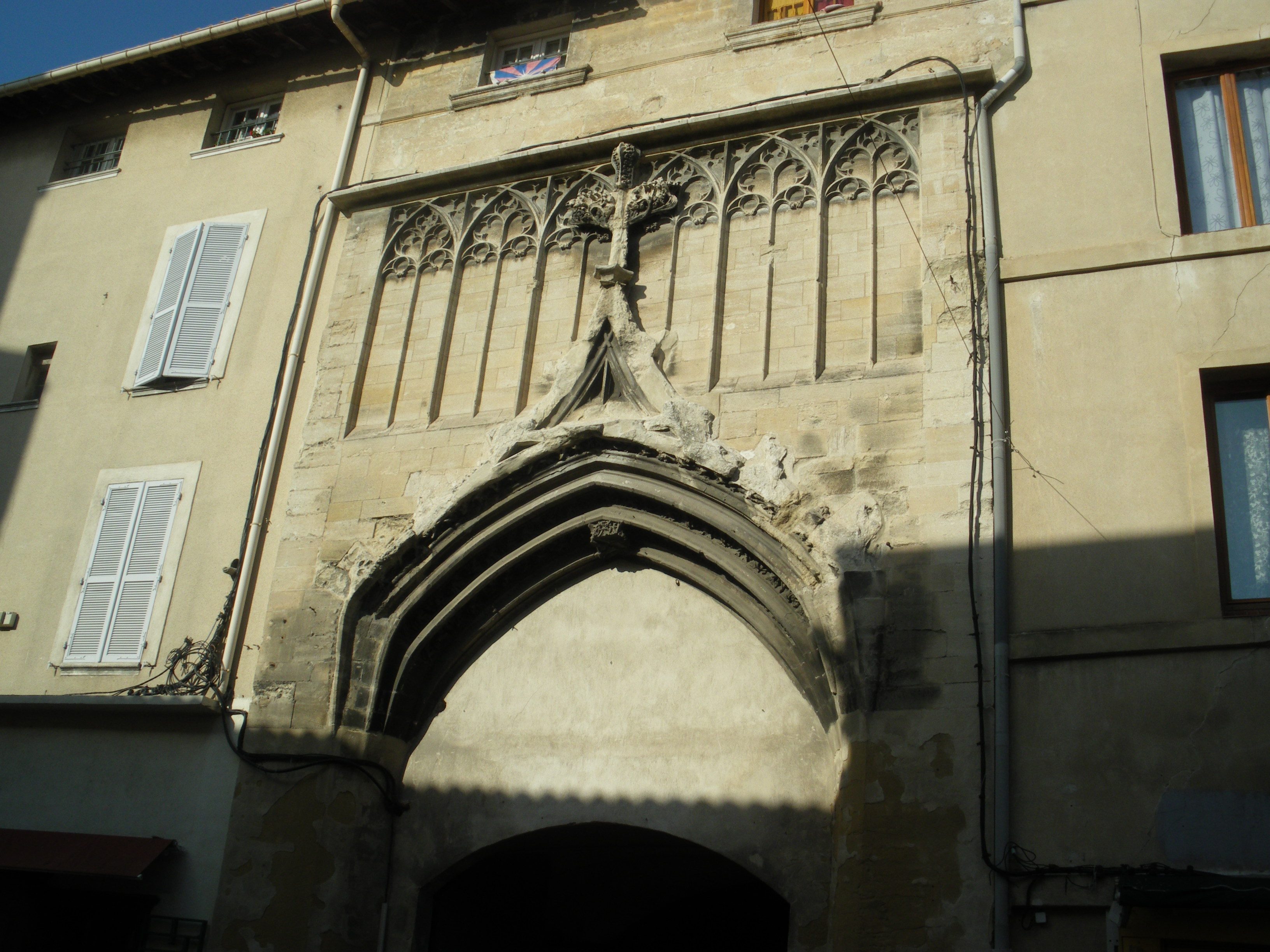 une facade, 31 rue de la Carreterie à Avignon : porte du couvent des Carmes (XVe siècle), entrée du théâtre Essaïon-Avignon